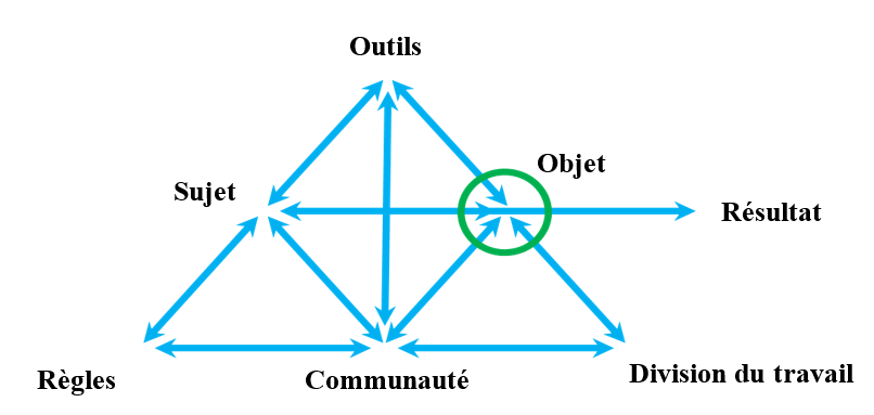 La troisième génération de la théorie de l'activité.